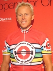 Bob Mionske, Interbike 2007